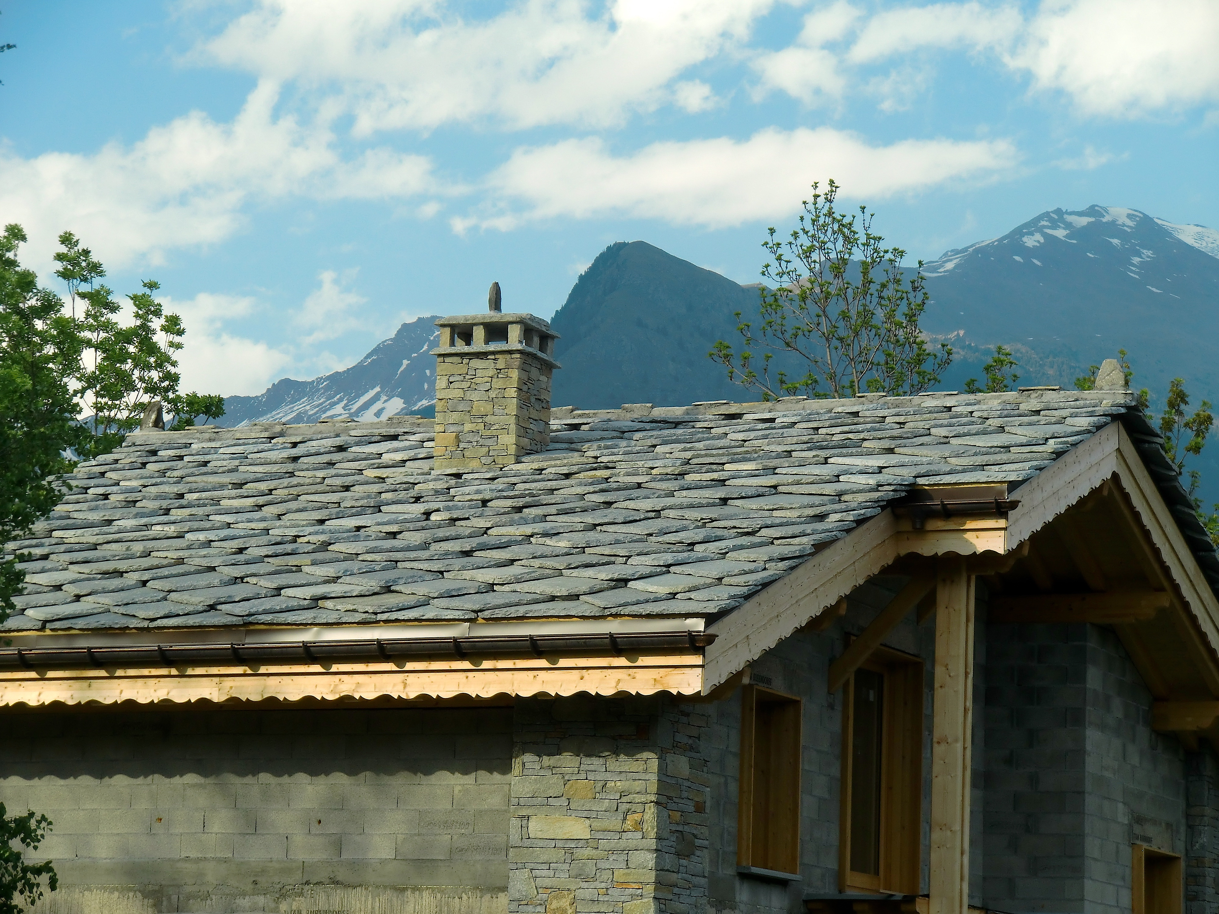 Couverture en lauzes d'un chalet Savoyard en cours de construction, respectant le cahier architectural